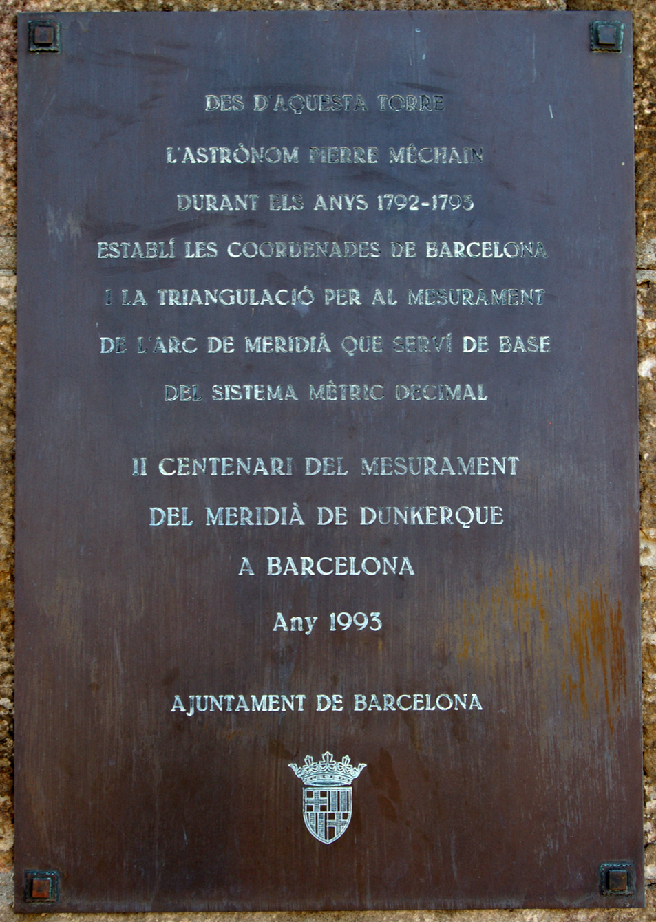 Placa commemorativa a una torre del Castell de Montjuïc a Barcelona (Catalunya).